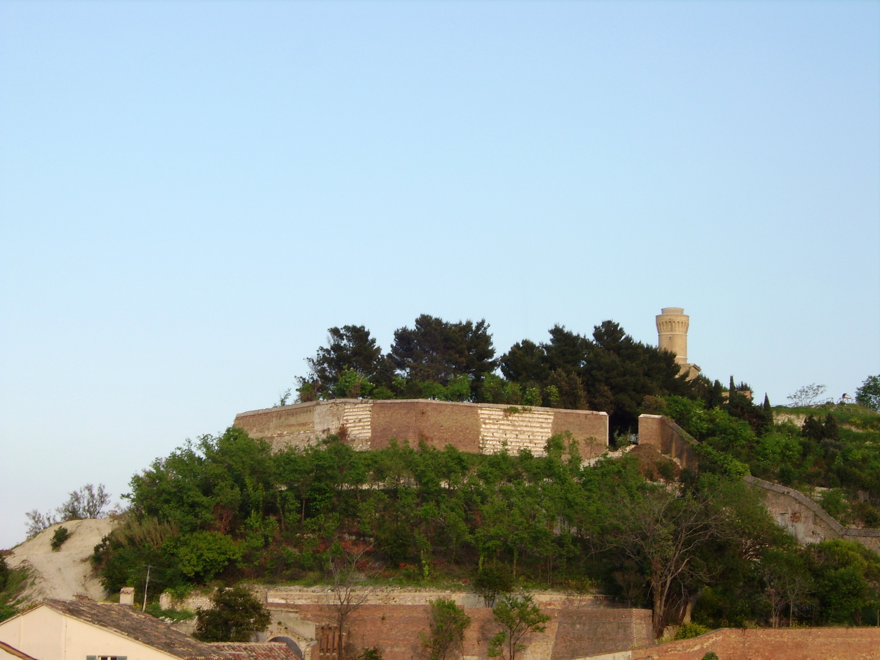 Il vecchio faro di Ancona nel Parco del Cardeto.